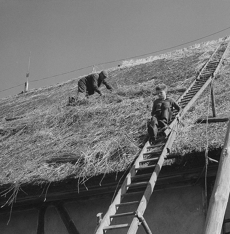 Original image description from the Deutsche Fotothek Thesenvitz-Ramitz. Dachdecker auf einem Reetdach